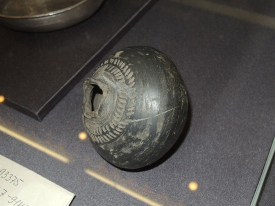 Кубышка, 17 век, ГИМ